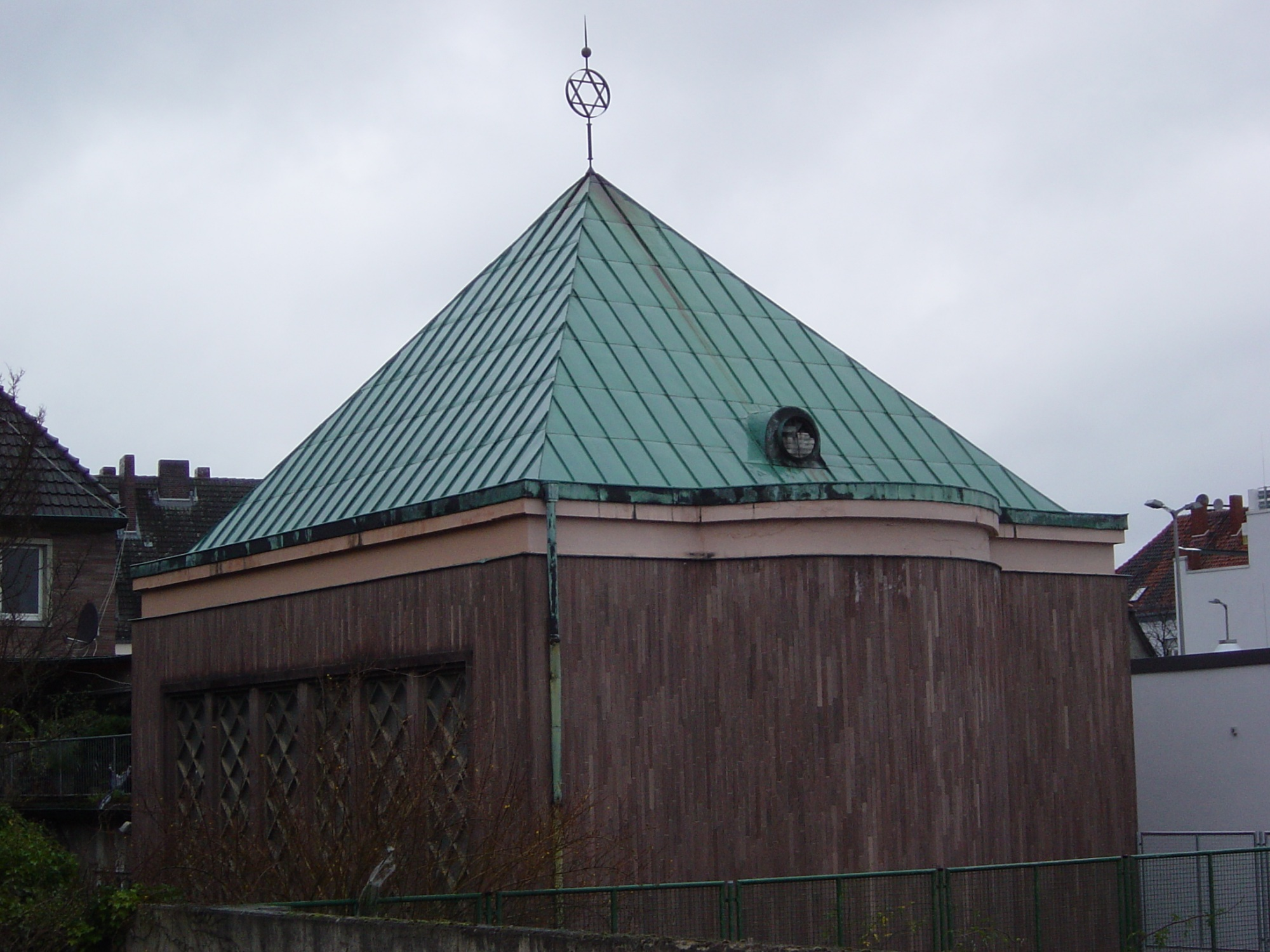 Synagoge Minden, Kampstr. 6, 32423 Minden